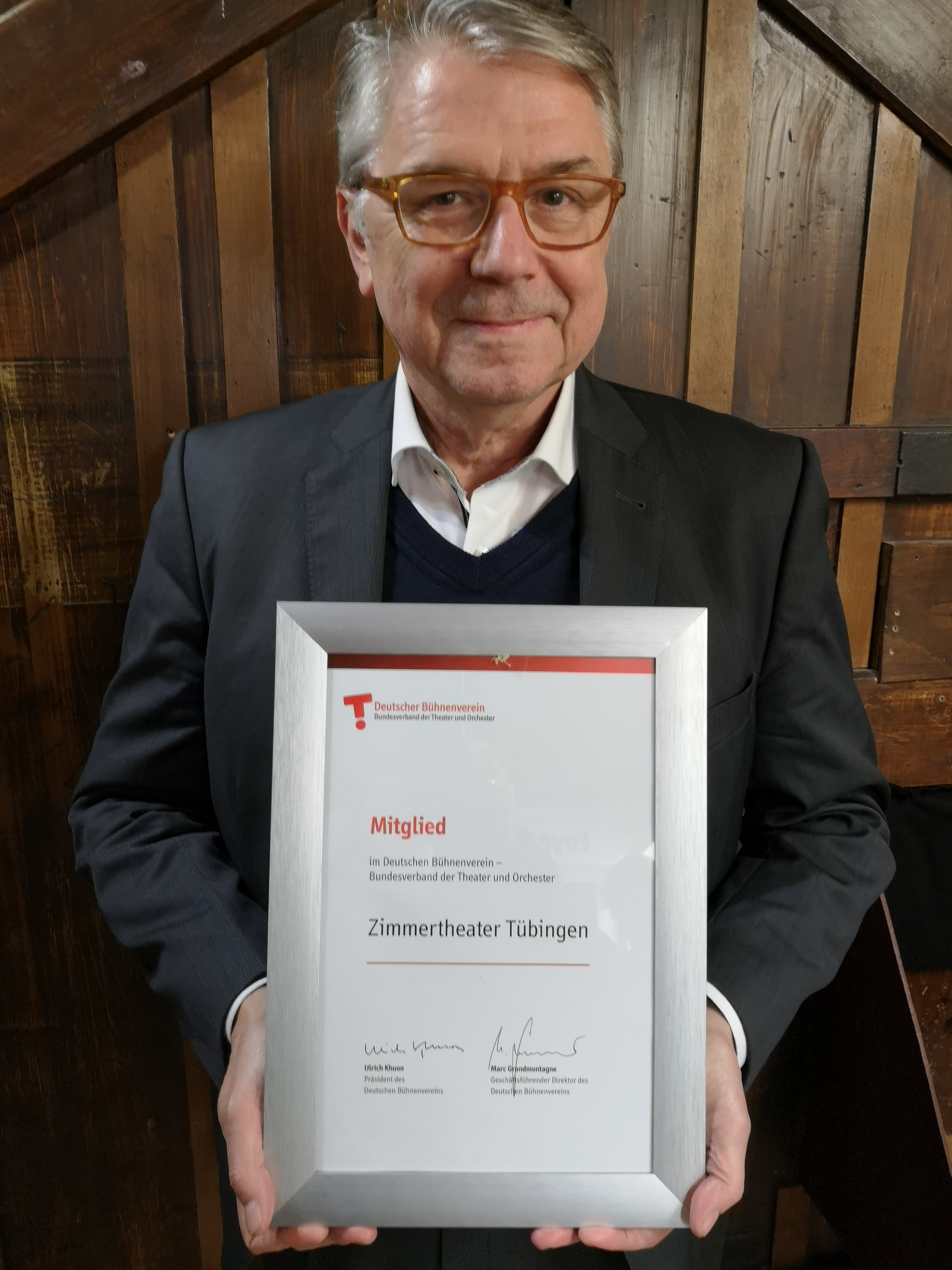 Der Präsident des Deutschen Bühnenverein, Ulrich Khuon übergibt bei der Feierstunde zum 60. jährigen Bestehen des Zimmertheater Tübingen, die Aufnahmeurkunde in den Deutschen Bühnenverein. Damit wird aus dem "Zimmertheater Tübingen", das "Stadttheater Tübingen" mit allen daraus resultierenden Rechten und Pflichten. Z.B. erhalten dadurch alle engagierten Schauspieler*innen die, zwischen der GDBA, Genossenschaft Deutscher Bühnenangehöriger und dem Deutschen Bühnenverein, tariflich vereinbarte Mindestgage.